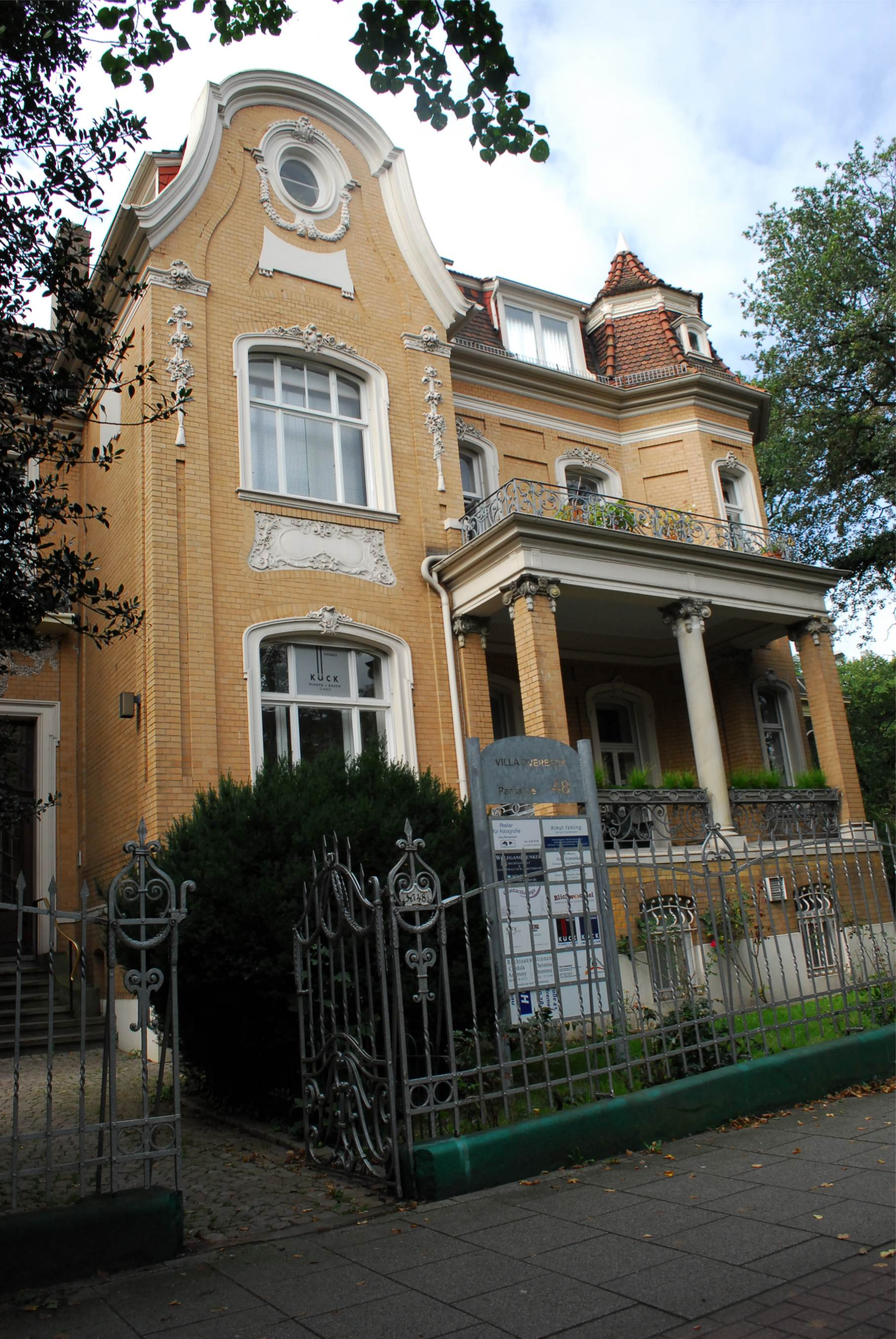 Villa Overbeck in Bremen, Parkallee 48 / Hermann-Böse-Straße.Das abgebildete Objekt ist ein geschütztes Kulturdenkmal in der Freien Hansestadt Bremen, mit der Nr. 0998 beim Landesamt für Denkmalpflege registriert.